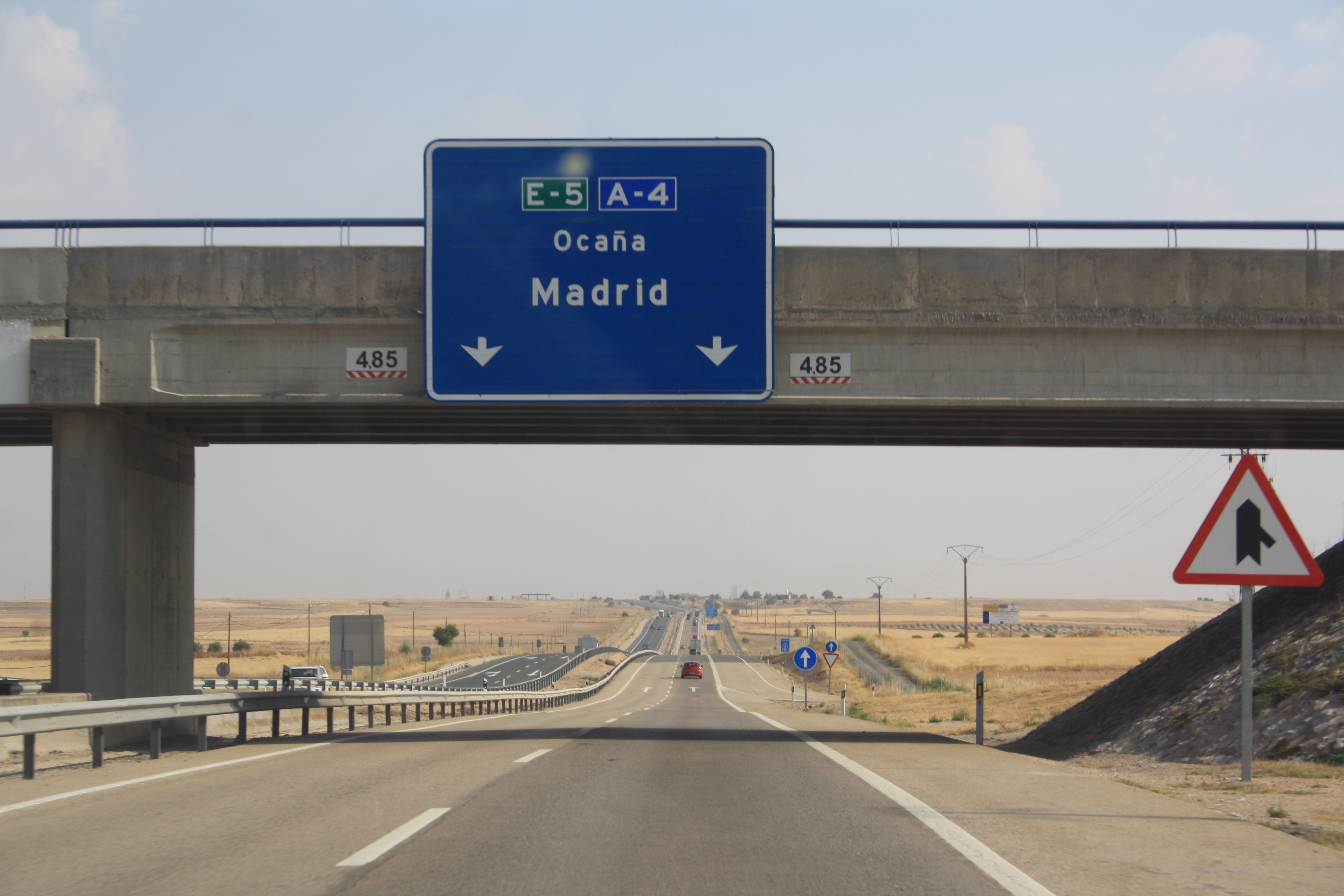 A-4 au niveau de Madrid